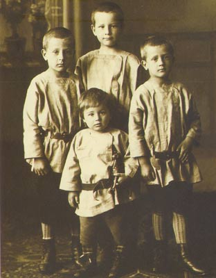 Павел, Аляксей, Вячаслаў і Мікалай Багдановічы – зводныя браты Максіма Багдановіча ад 3-га шлюбу бацькі з Аляксандрай Апанасаўнай Мякотай. [1910-я гг.].